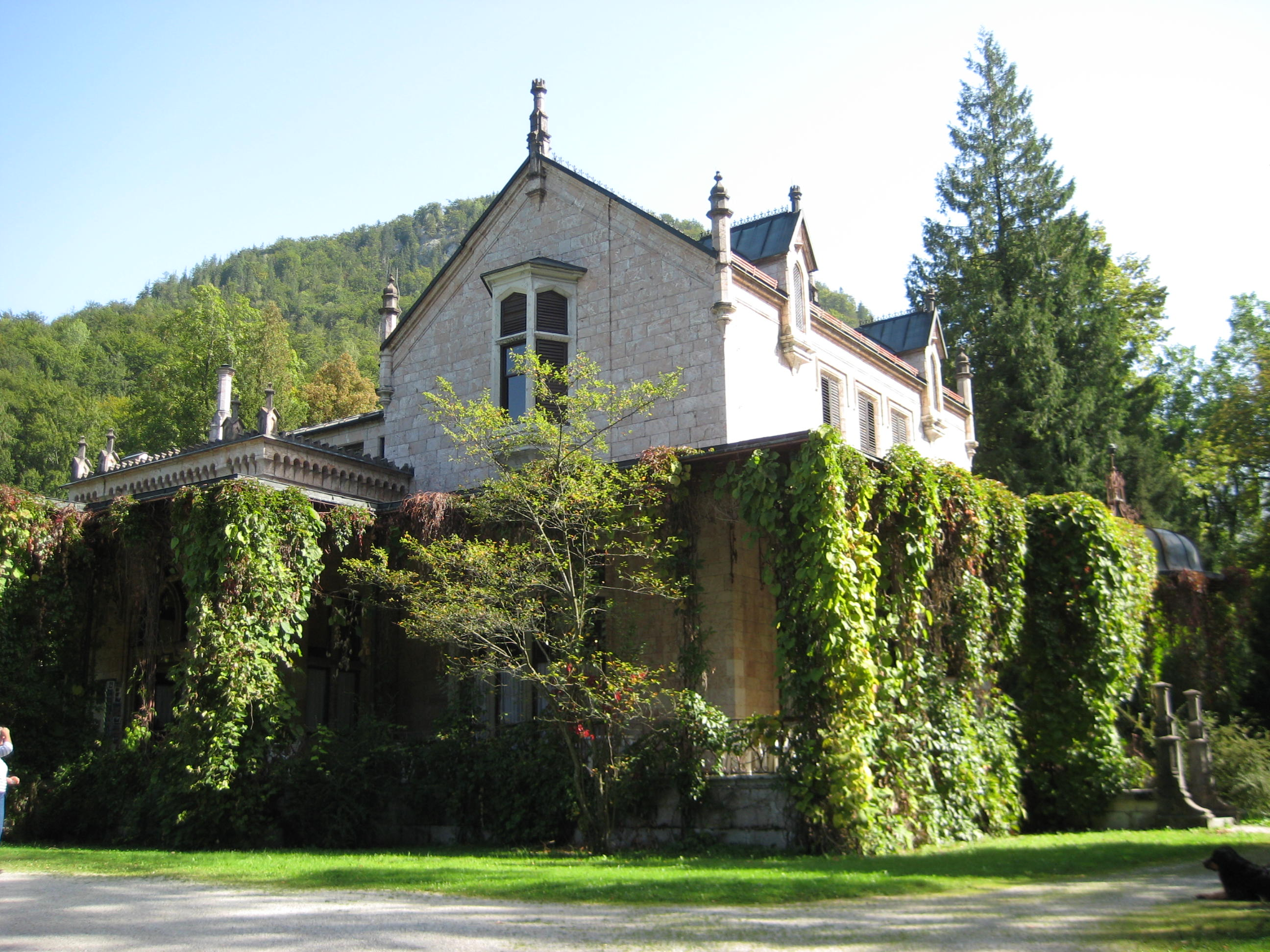 Das Marmorschlössl in Bad Ischl, jetzt Photomuseum im Kaiserpark, einst Teehaus von Sisi, oberhalb der Kaiservilla